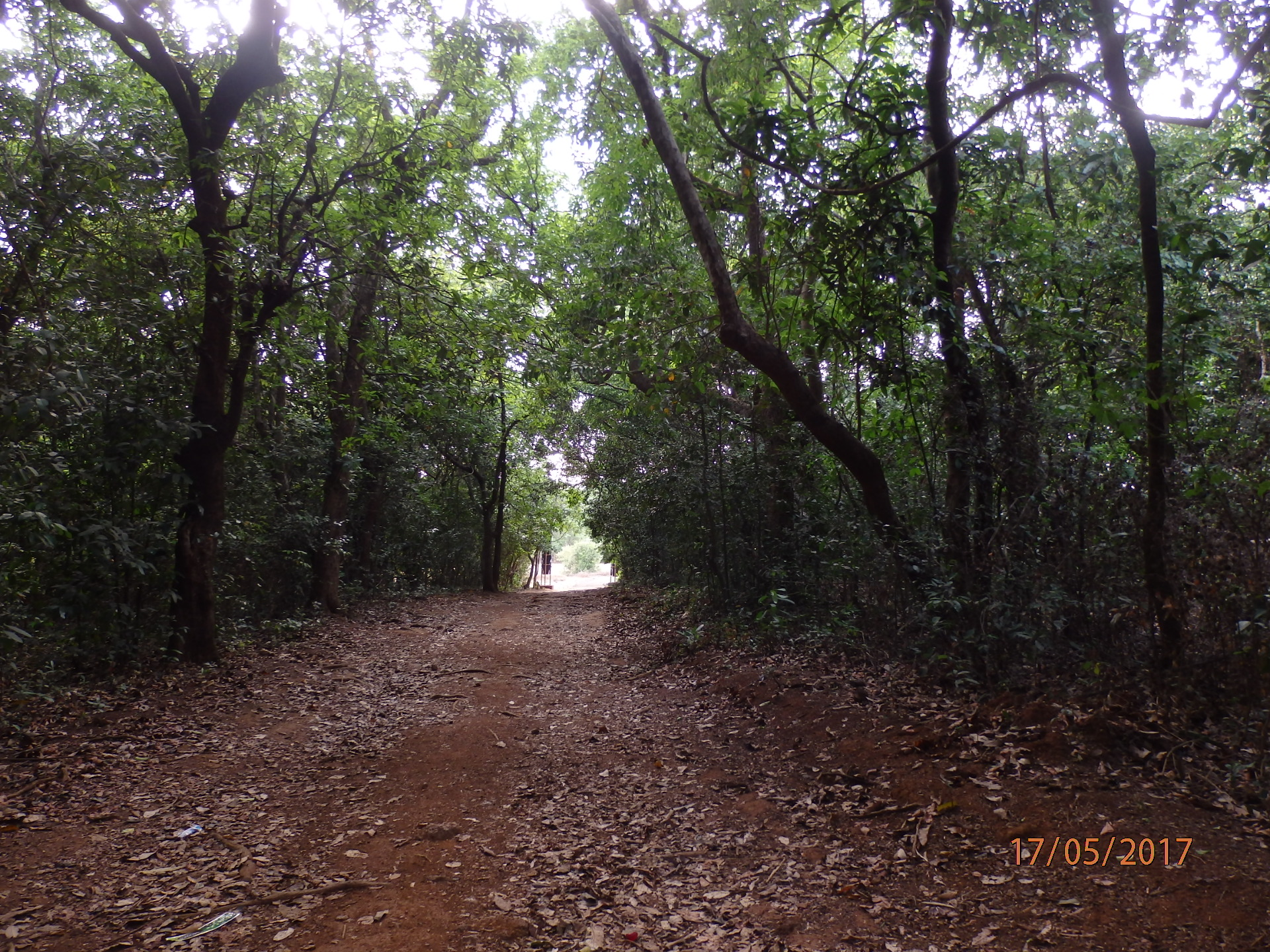 आंबा येथील देवराईतून आंबेश्वर मंदिराकडे जाणारा रस्ता